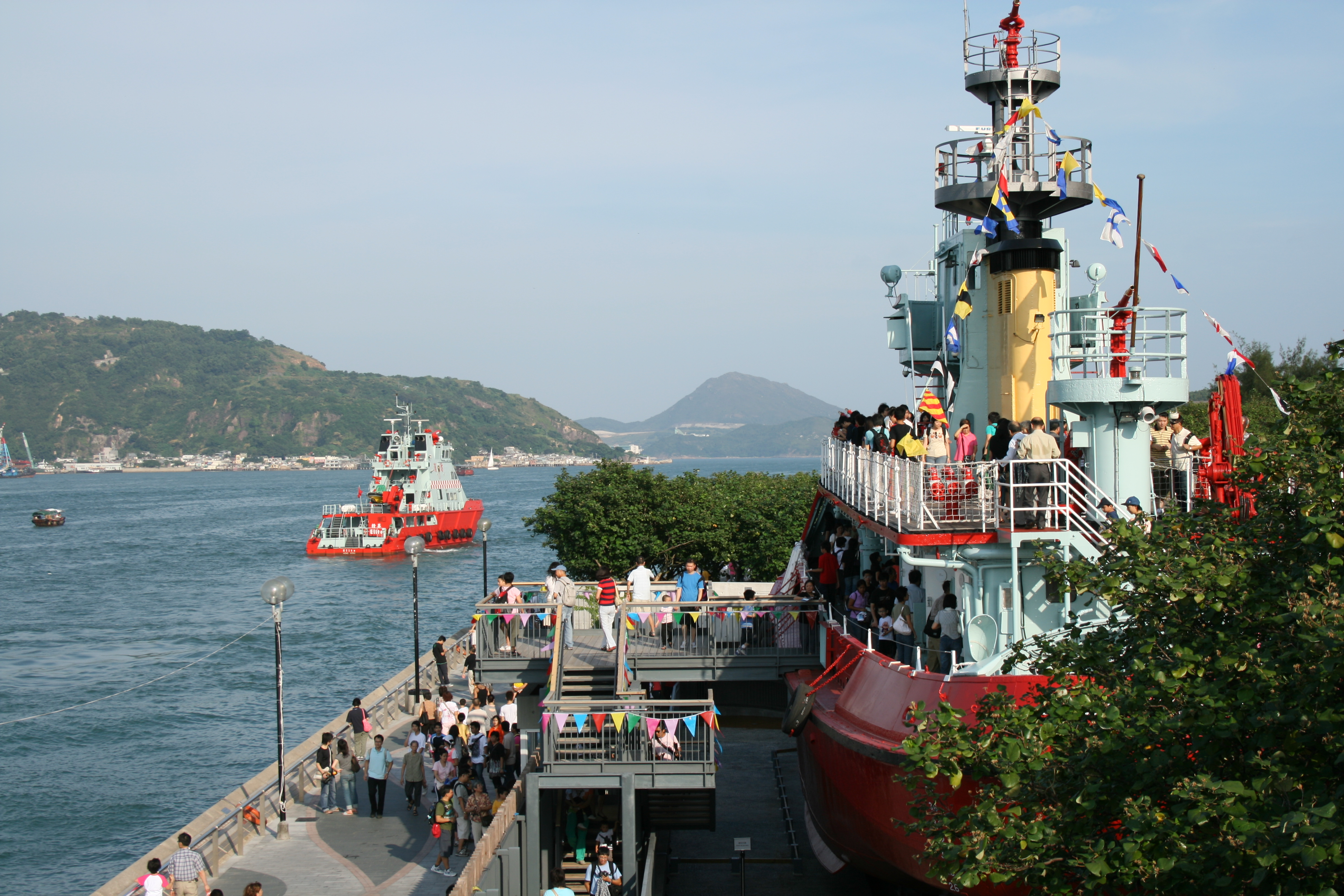 滅火輪精英號及葛量洪號